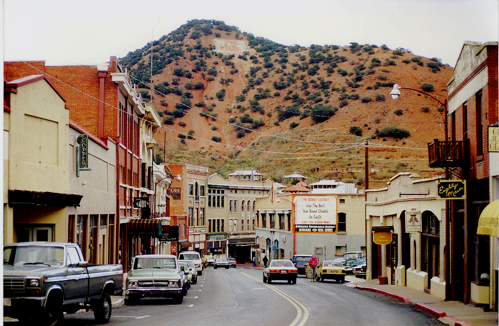 Bisbee, Arizona